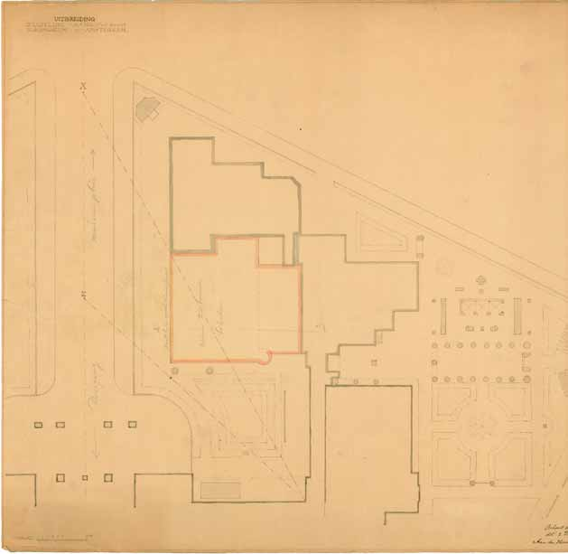 Situatieplan van het zuidwestelijk deel van het Rijksmuseumge- bouw in verband met de voorgenomen uit- bouw van de Drucker- zalen, 2 februari 1912. Nederlands Architec- tuurinstituut, Rotter- dam (Ryks t2277).